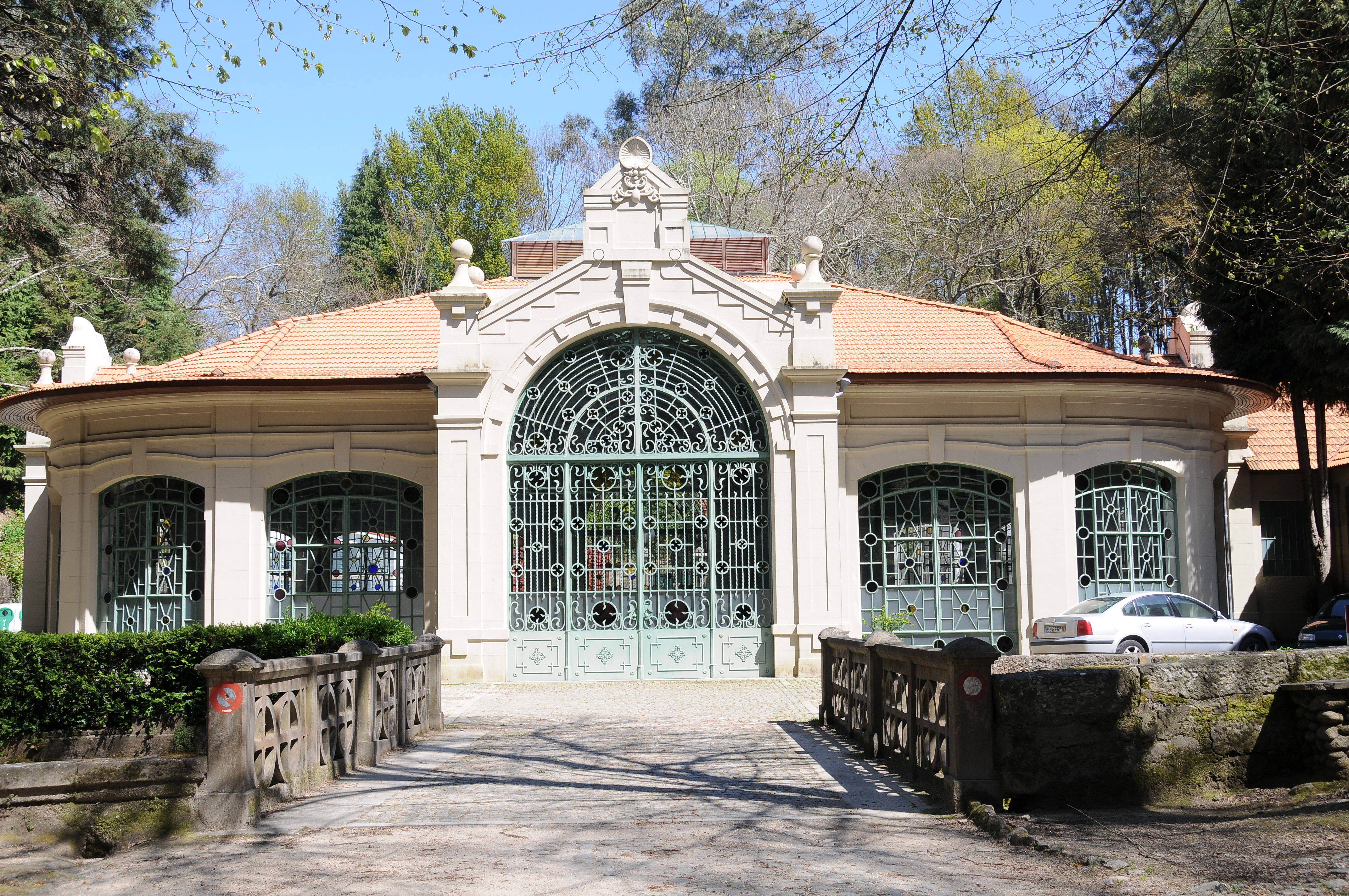 Termas de Melgaço em Paderne, Melgaço, Portugal.